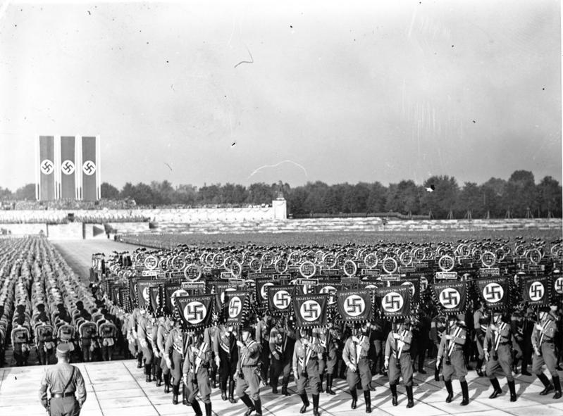 Nürnberg, Reichsparteitag Reichsparteitag 1938 Der grosse Appell der SS, NSKK, NSFK und SS im Luitpoldhain. Uebersicht während des Fahnenaufmarsches. Aufnahme: 10.9.38